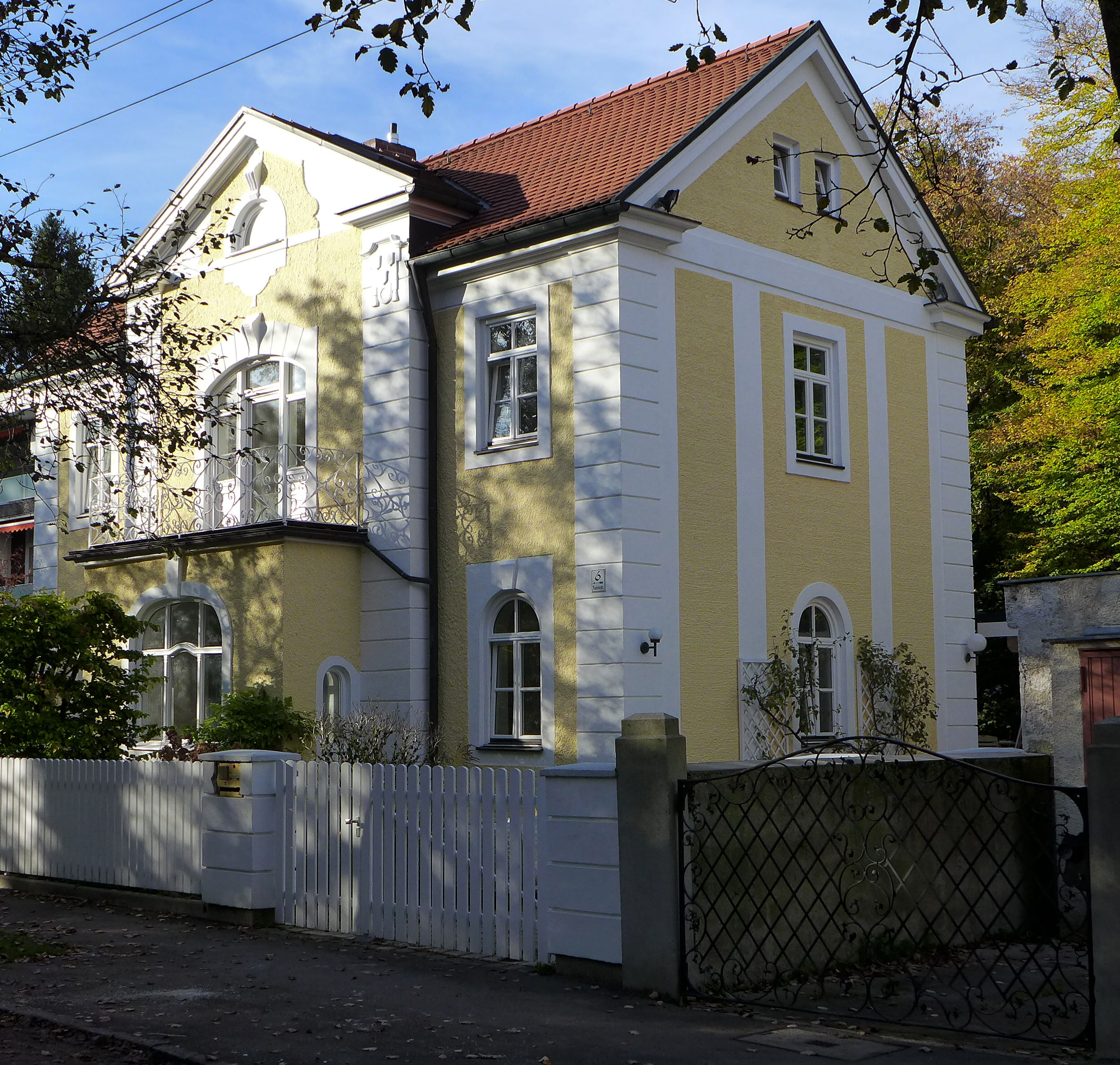 Rubensstr 6 in München